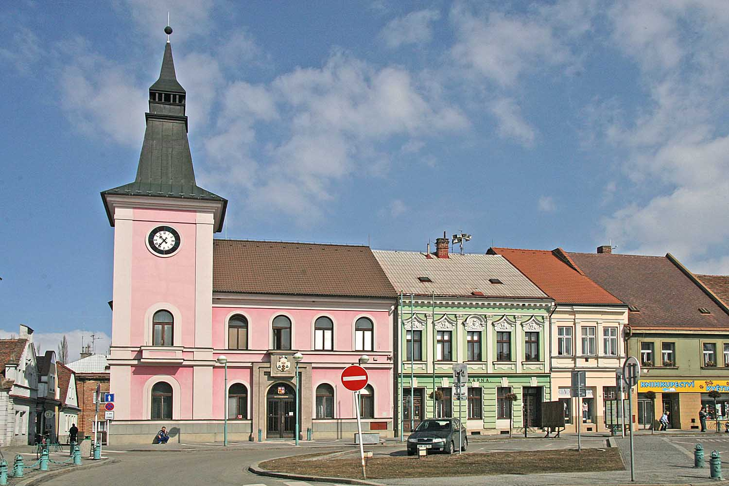 Třebechovice pod Orebem, náměstí s radnicí, district Hradec Králové, Czech Republic autor: Prazak date: 23. 3. 2006